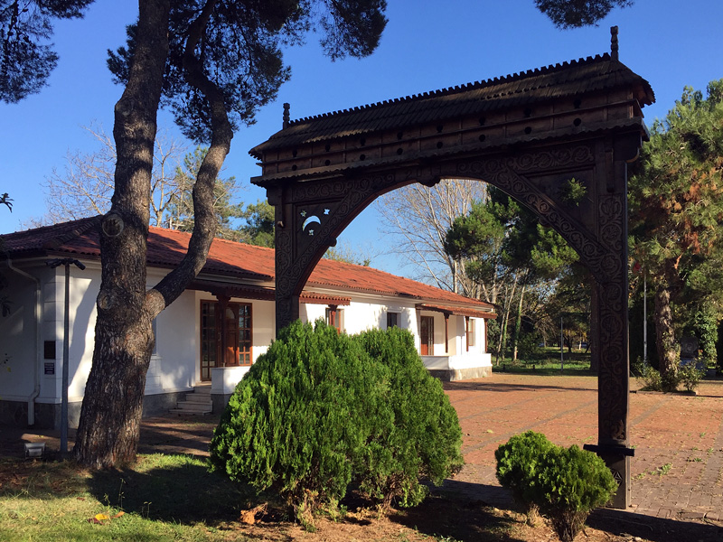 Izmit - İmre Tököli Anı Evi, museum